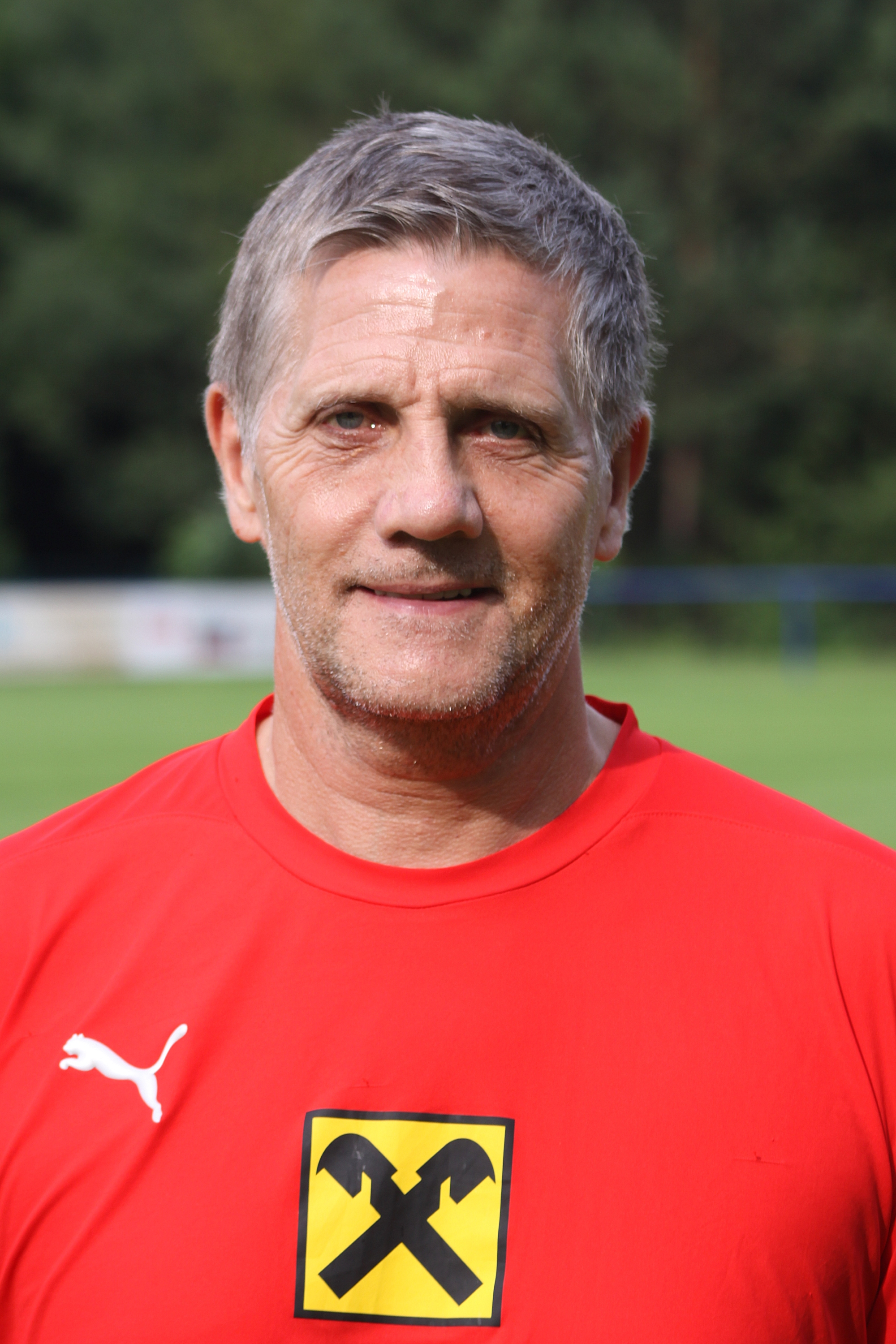 Roger Spry (Individualtrainer) - Österreichische U-21-Fußballnationalmannschaft (1)